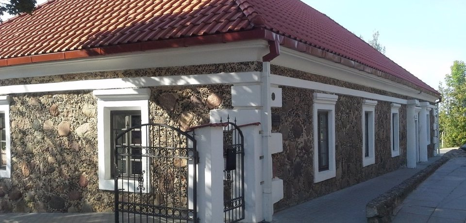 XIX a. Lankasterio sistemos mokykla, dab. Kupiškio etnografijos muziejus